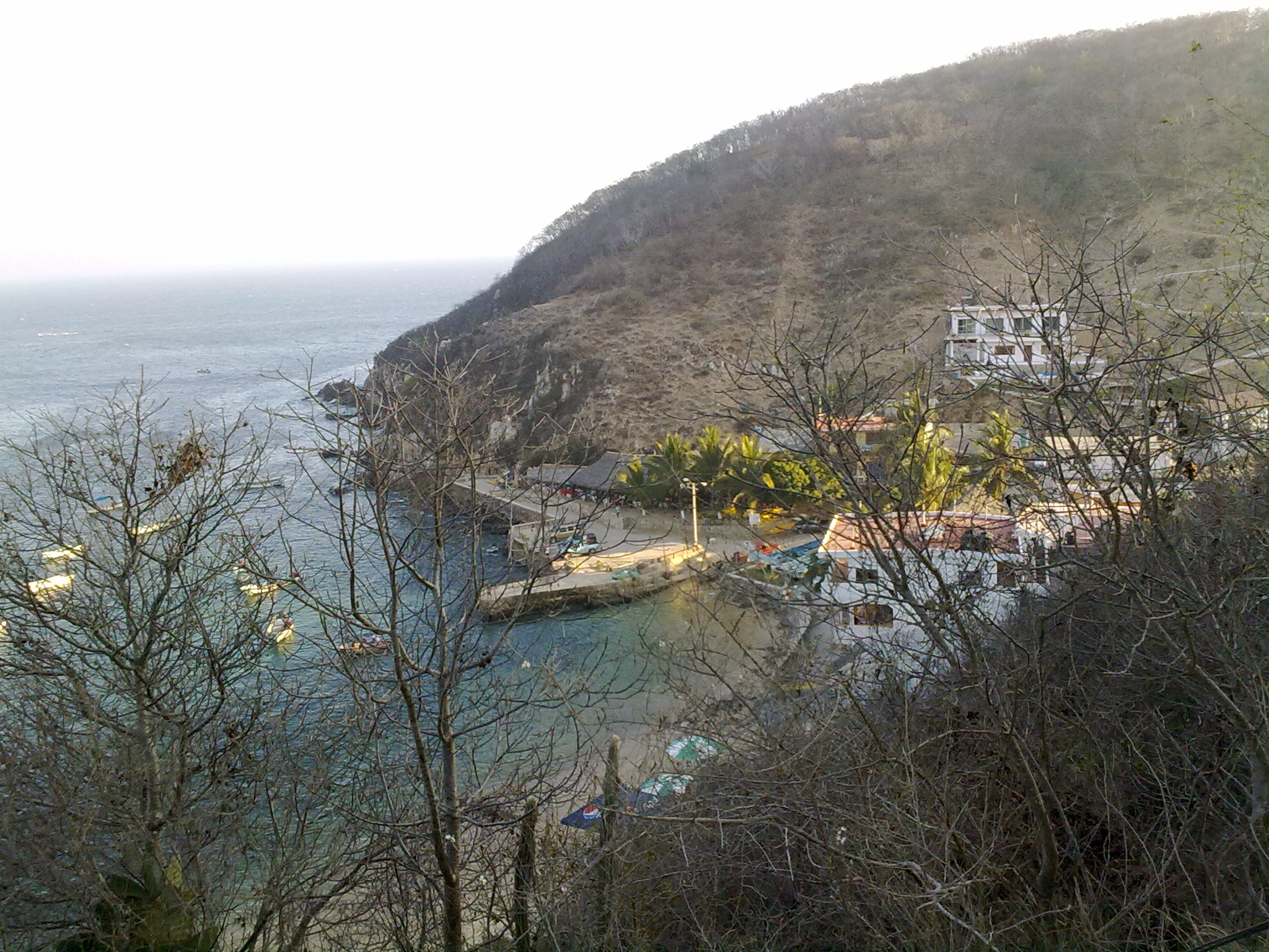 Bahia Tehuamixtle3